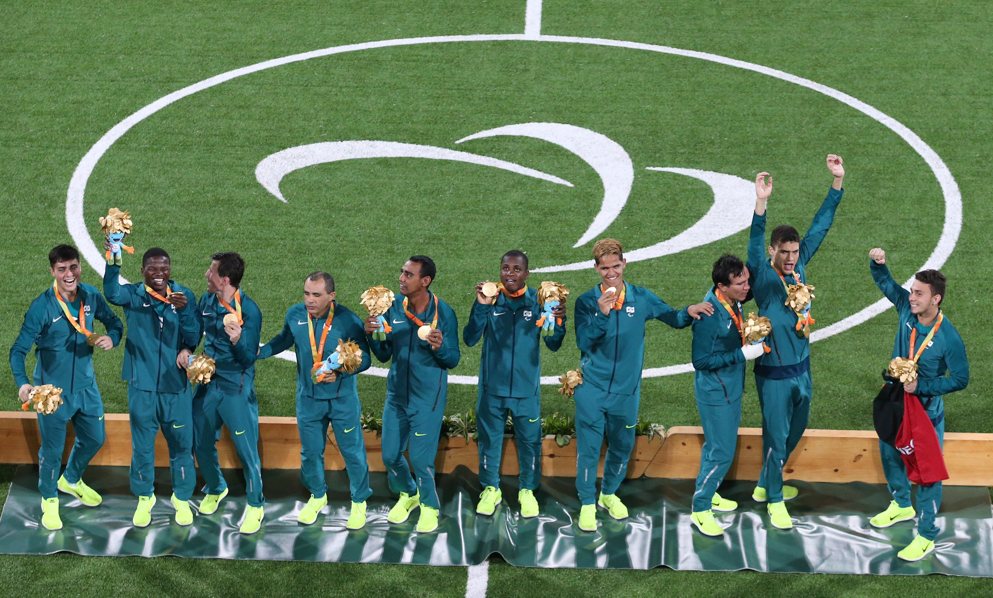 Brasil gana medalla de oro futbol 5 para ciegos. Juegos PaRALimpicos Río de Janeiro 2016